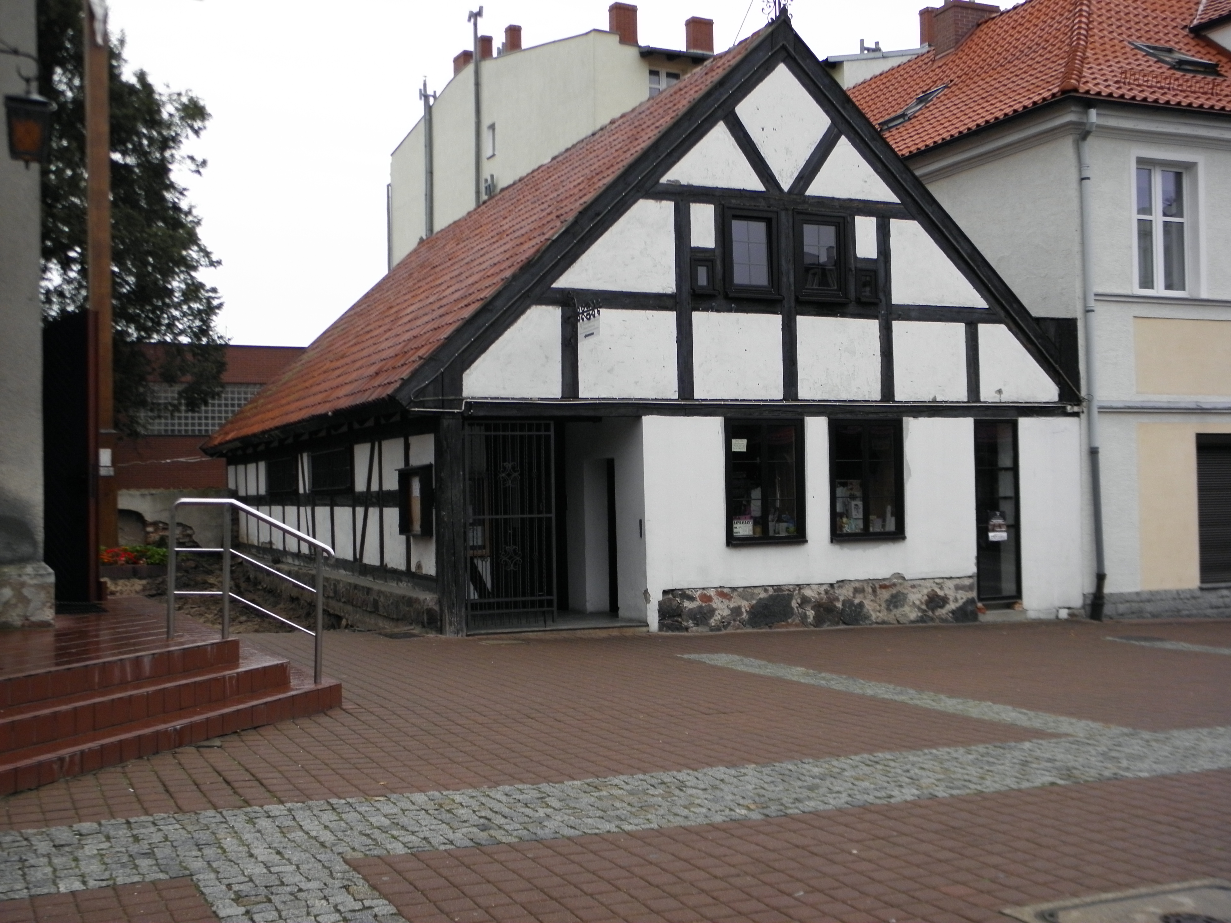 Wejherowo - Były szpitalik przy placu J. Wejhera, obecnie sklepik z dewocjonaliami (zabytek nr rejestr. 521)